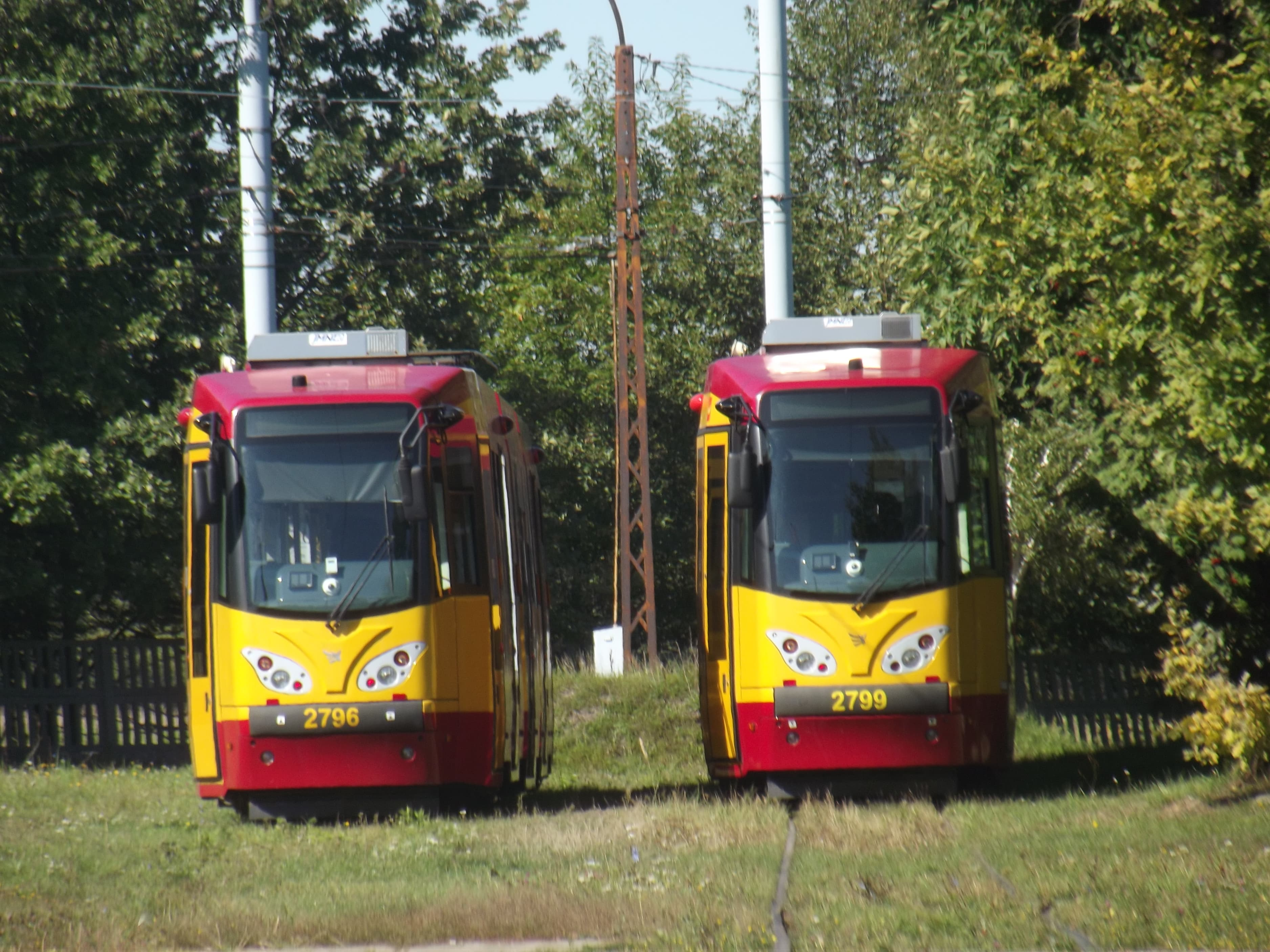 Duwagi M8CN podczas postoju w zajezdni Chocianowice